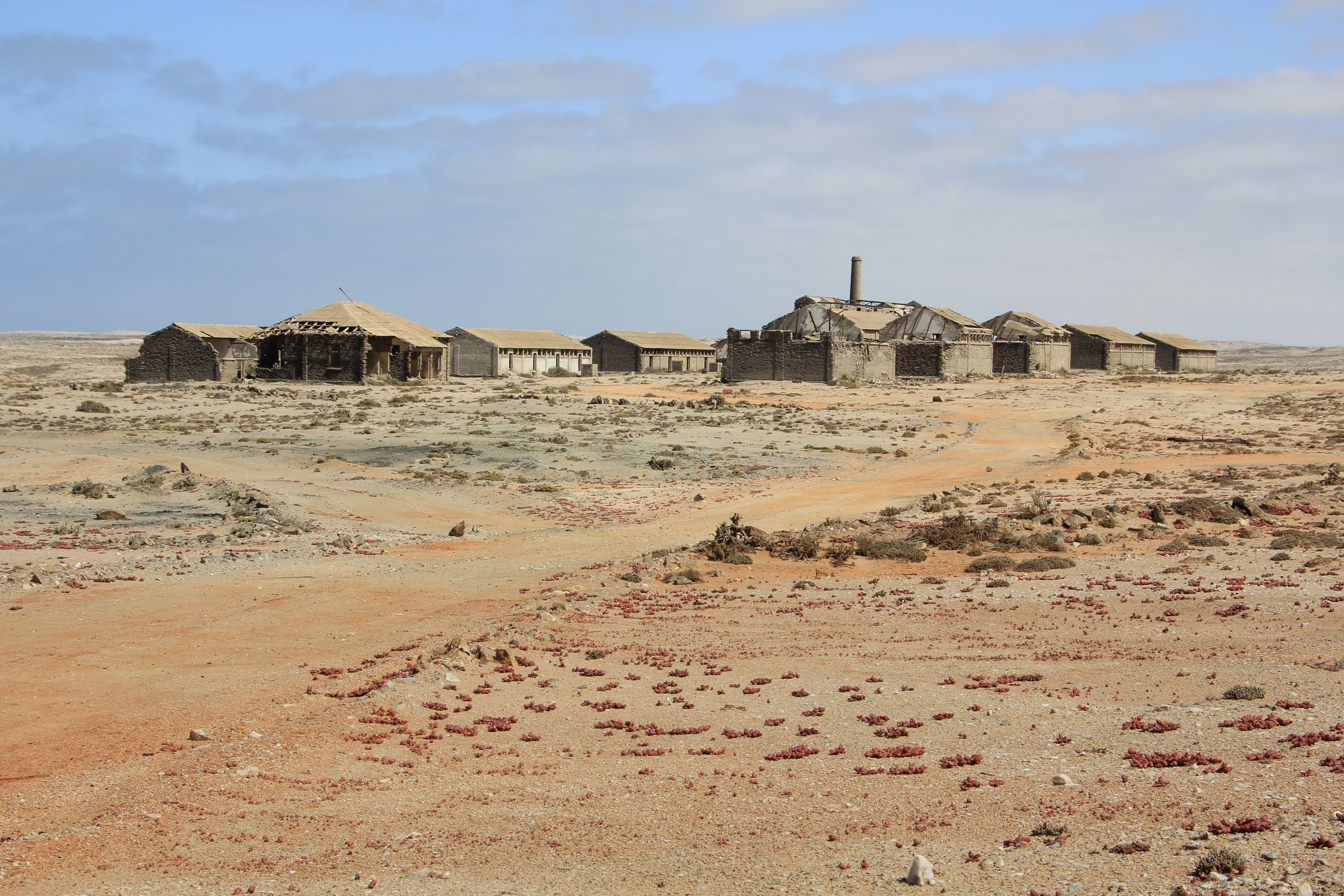 Ein Teil der Geisterstadt Elisabethbucht im Diamantensperrgebiet, Namibia.